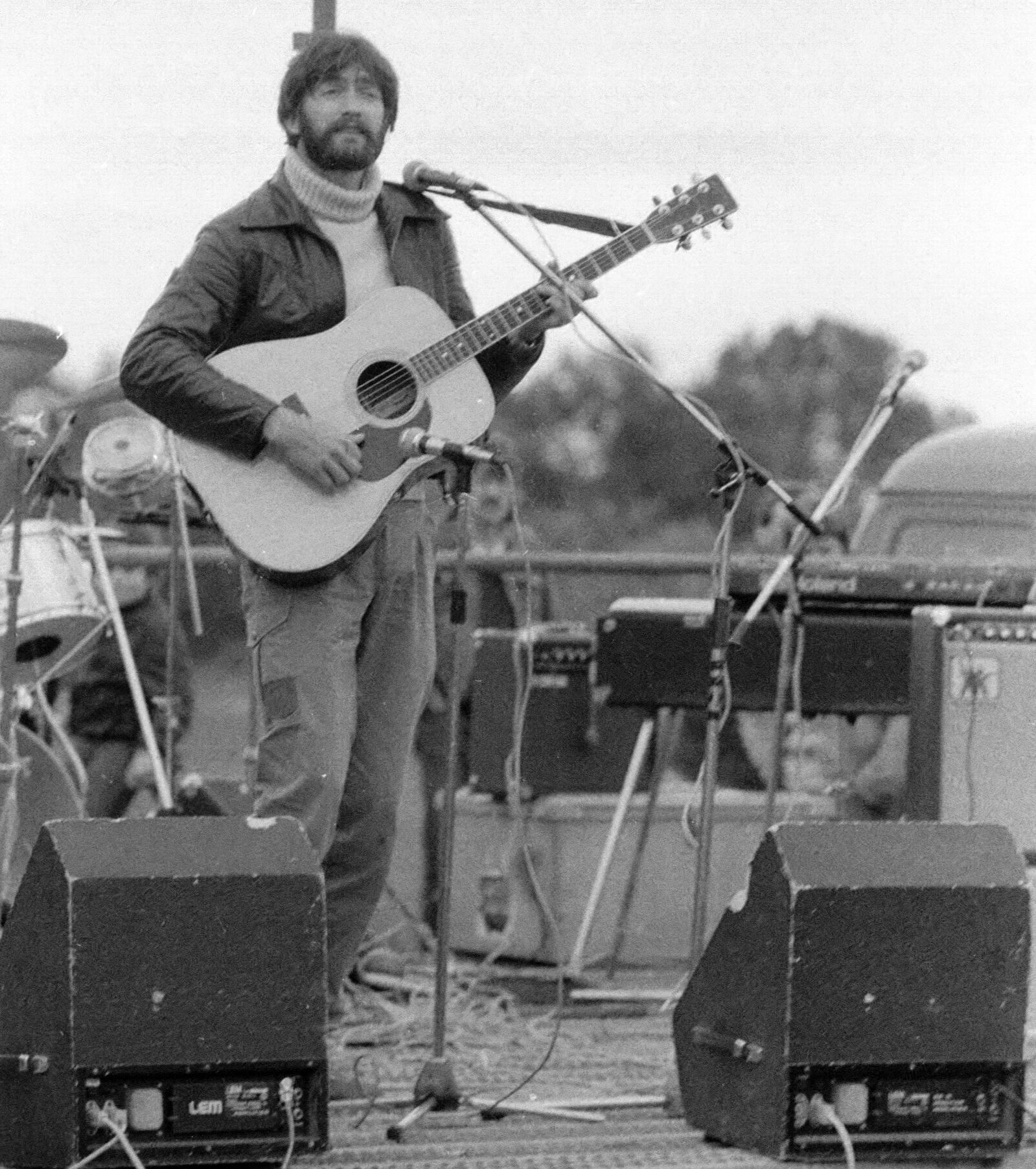 Hans Rotmo under Feginsfestivalen i Trondheim 1982. Foto Idar Lind.